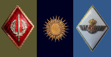 Distintivos de los Cuerpos de Intervención (extinguidos) de los Ejércitos de tierra, la Armada y el Ejército del Aire